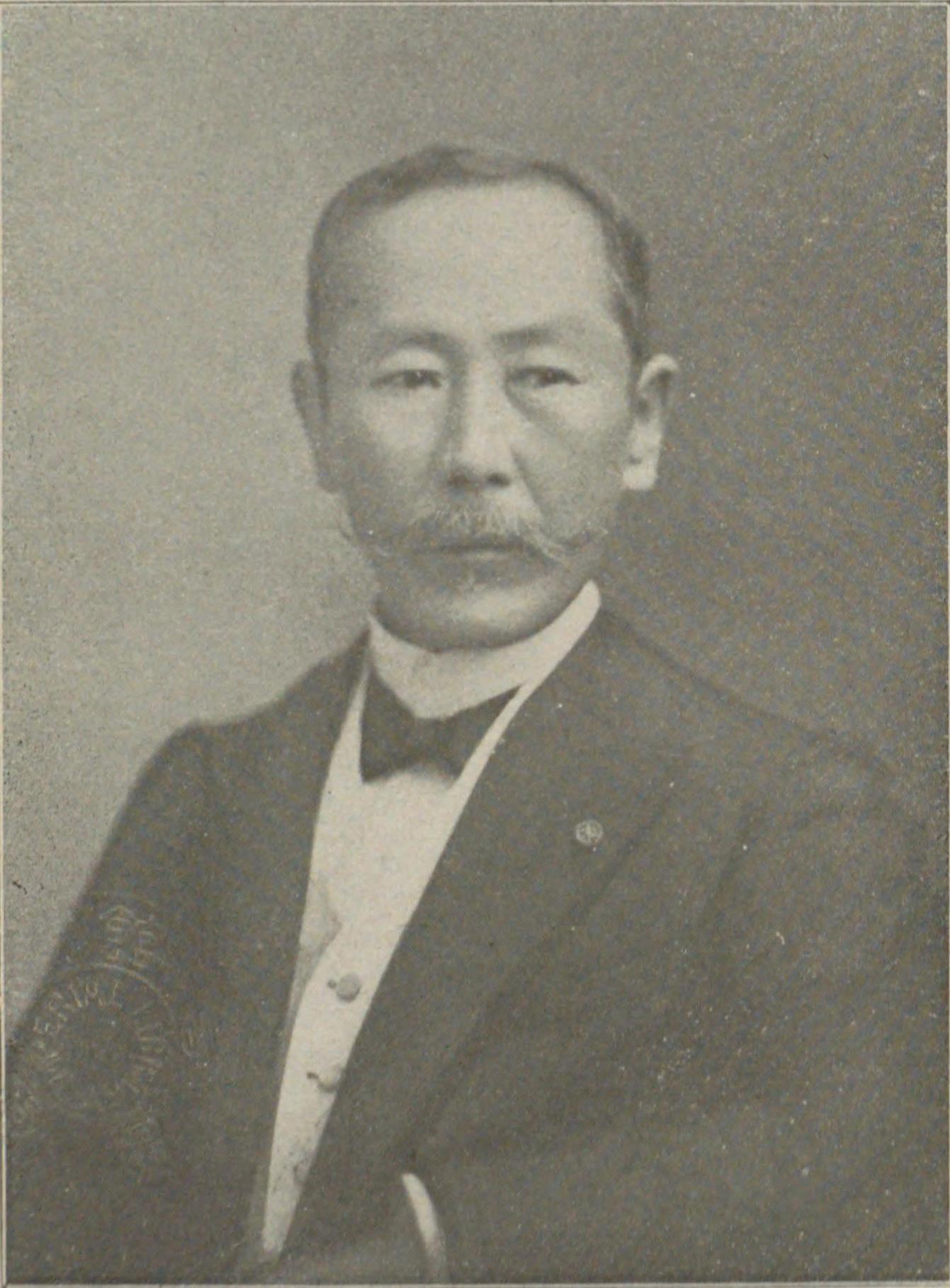 加太邦憲 明治41年9月撮影